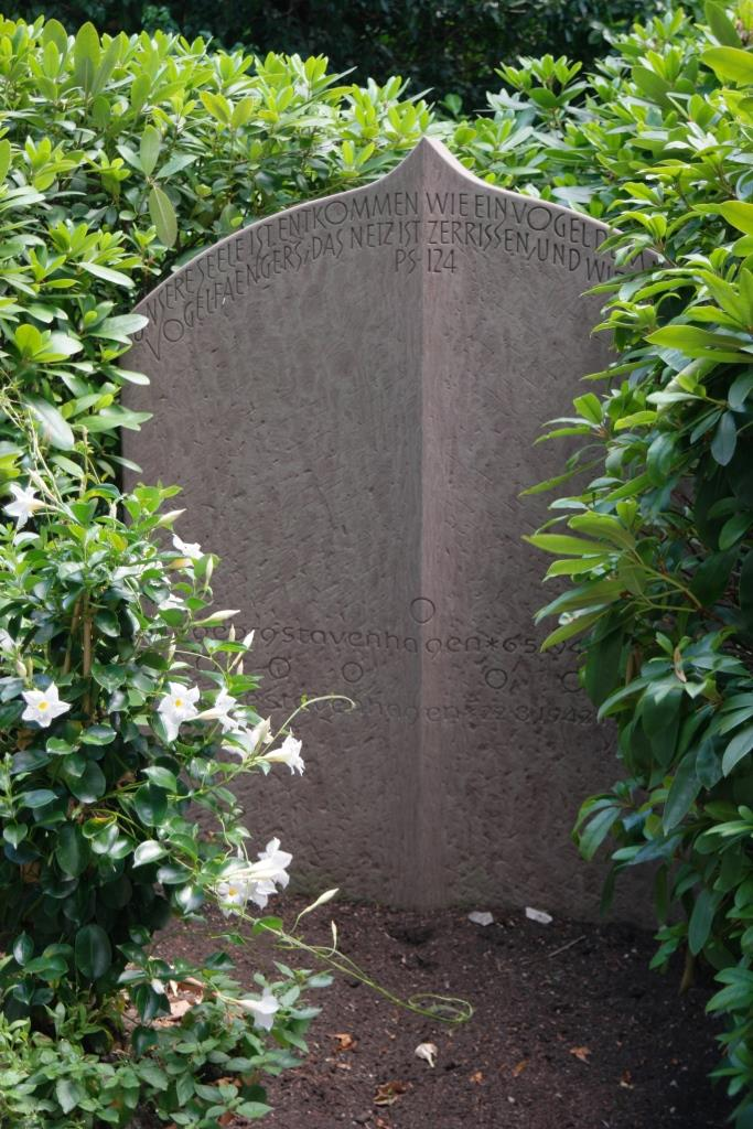 Grab von Lutz Stavenhagen, 1940-1992, Politiker; Pforzheim, Hauptfriedhof